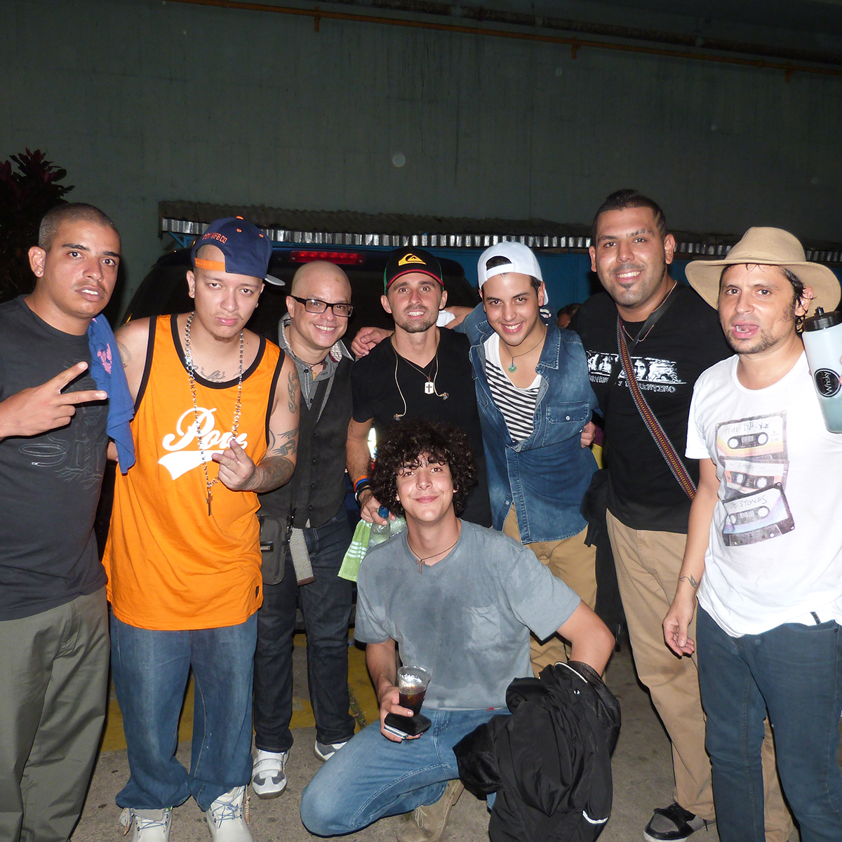 NK Luego de presentarse con Servando y Florentino "Los Mismos"